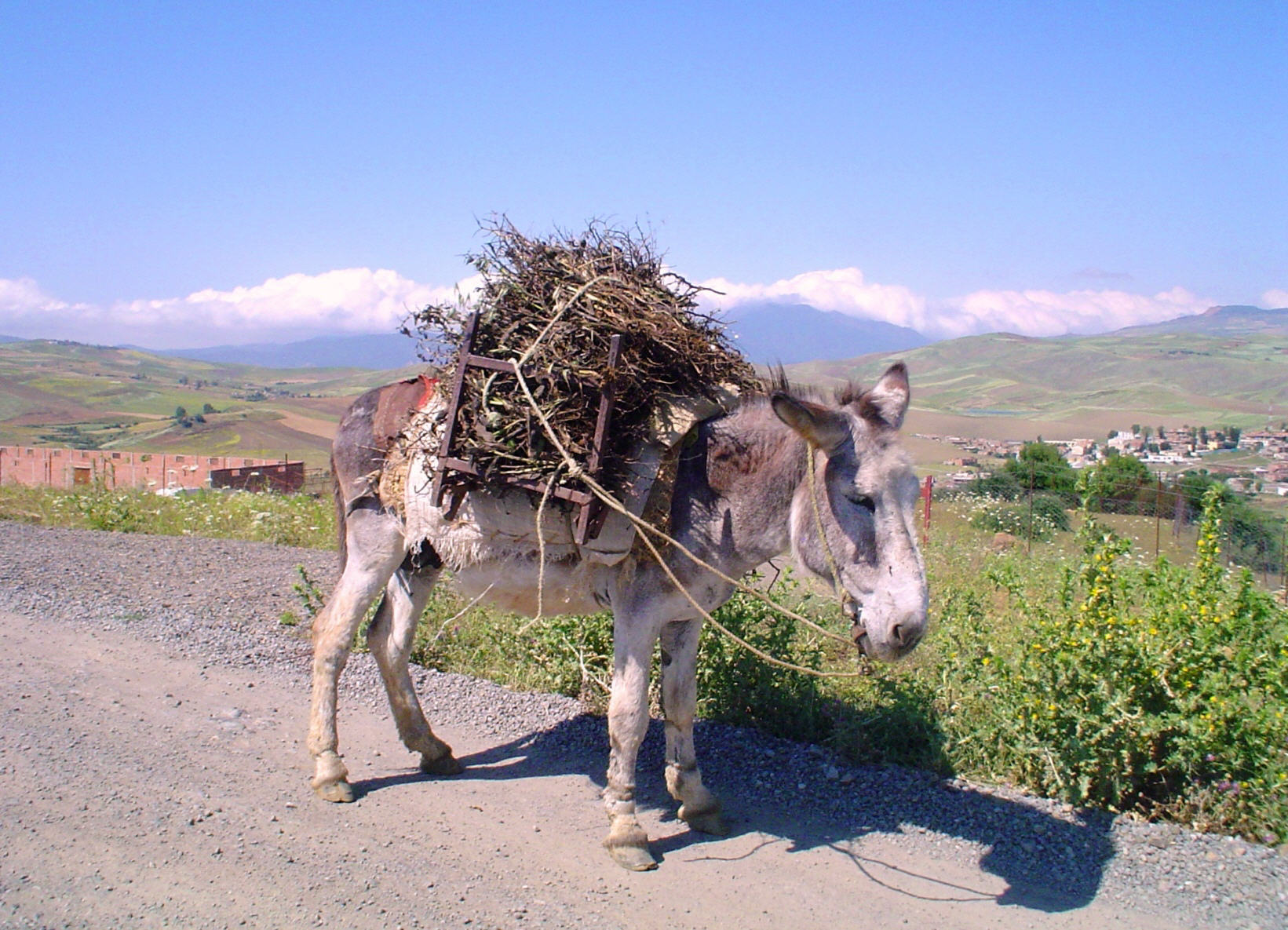 على طريق حناشة - واد حربيل بالمدية - الجزائر